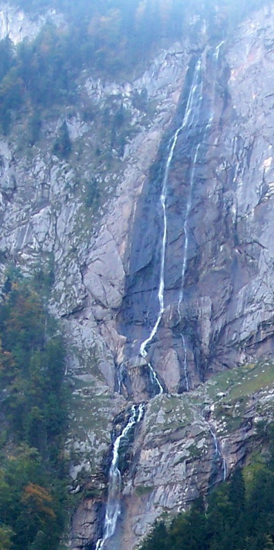 Röthbachfall, September 2005